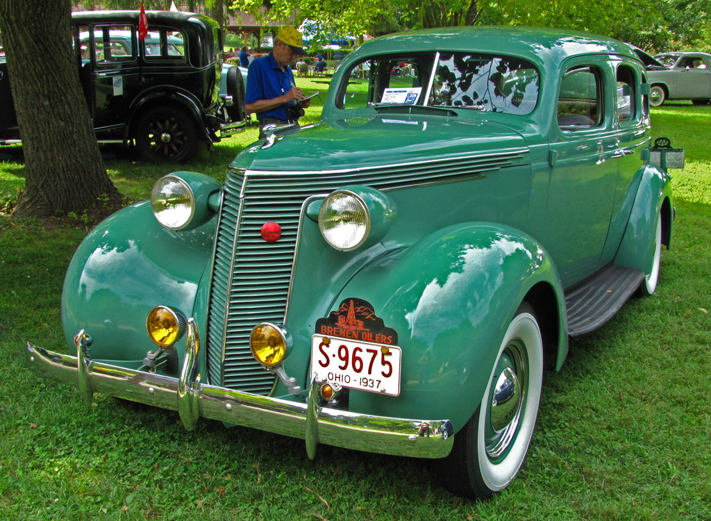 1937 Studebaker Dictator